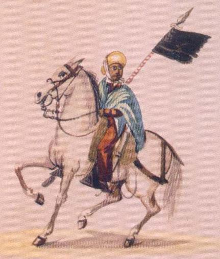 Montonero peruano, acuarela de Pancho Fierro.